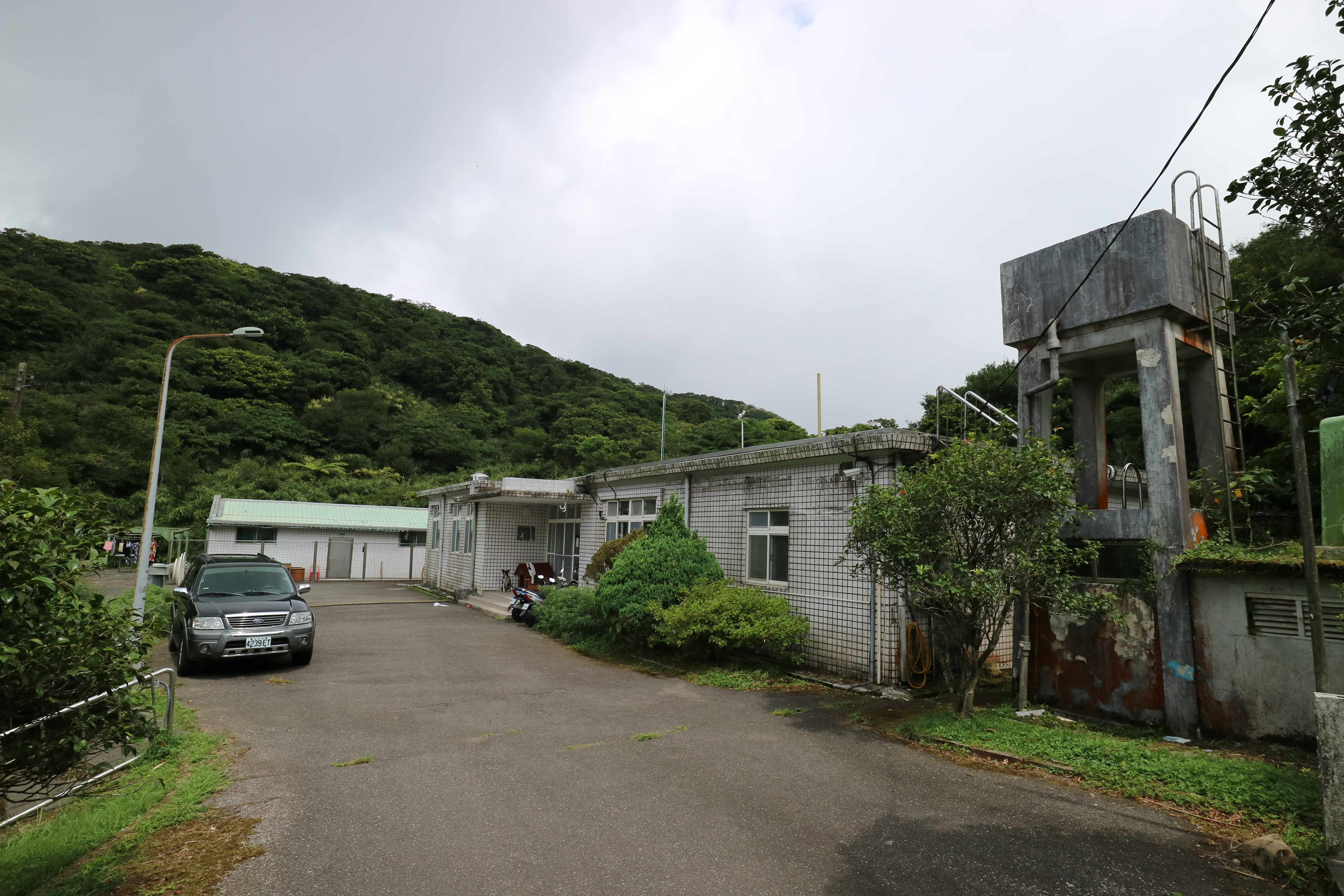 中文（台灣）: 交通部中央氣象局鞍部氣象站辦公廳